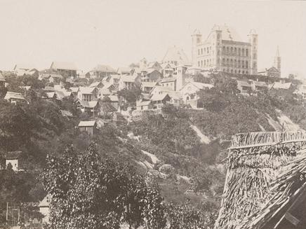 Palast der Königin; Antananarivo Geografische Zuordnung: Afrika südlich der Sahara\Indischer Ozean\Madagaskar\Antananarivo Museum für Völkerkunde Wien, Fotosammlung Inv.-Nr. VF_5501 Schenkung: Franz Sikora